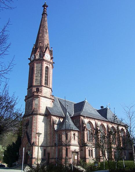 Lutherkirche Rudolstadt , Baujahr 1906, Neoklassizismus